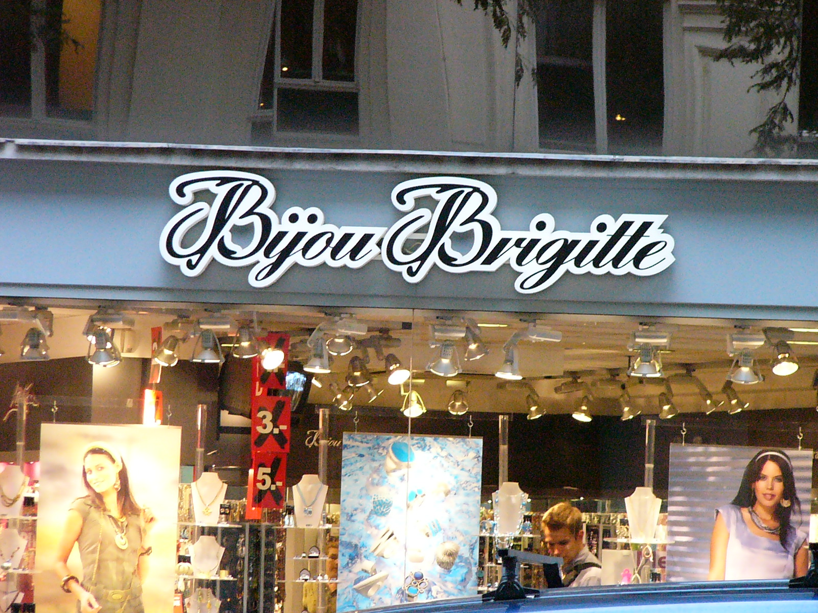 Tienda de la cadena de visutería y comlementes Bijou Brigitte en Viena (Austria)